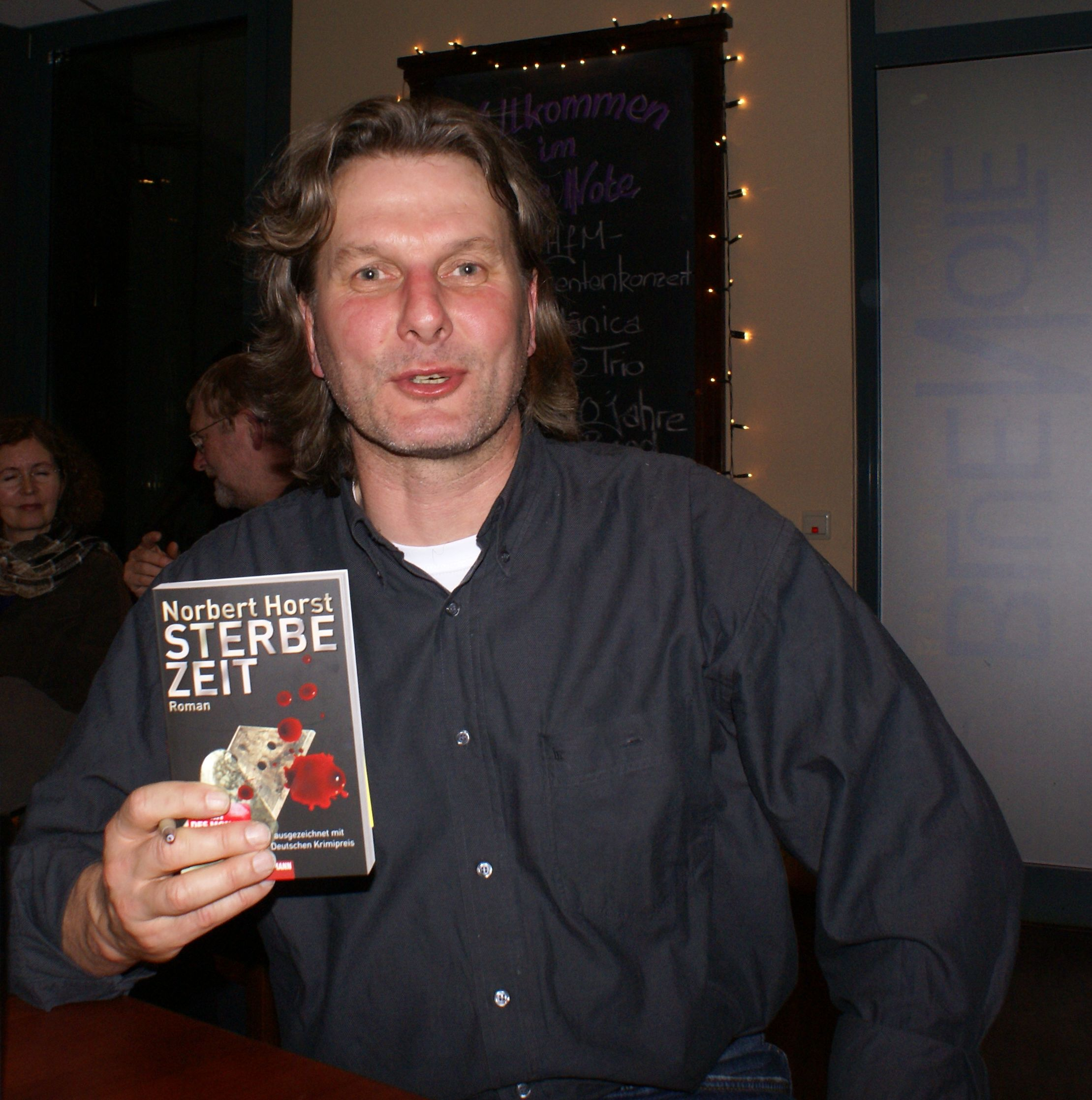 Norbert Horst bei einer Krimilesung in Osnabrück am 29. Oktober 2008